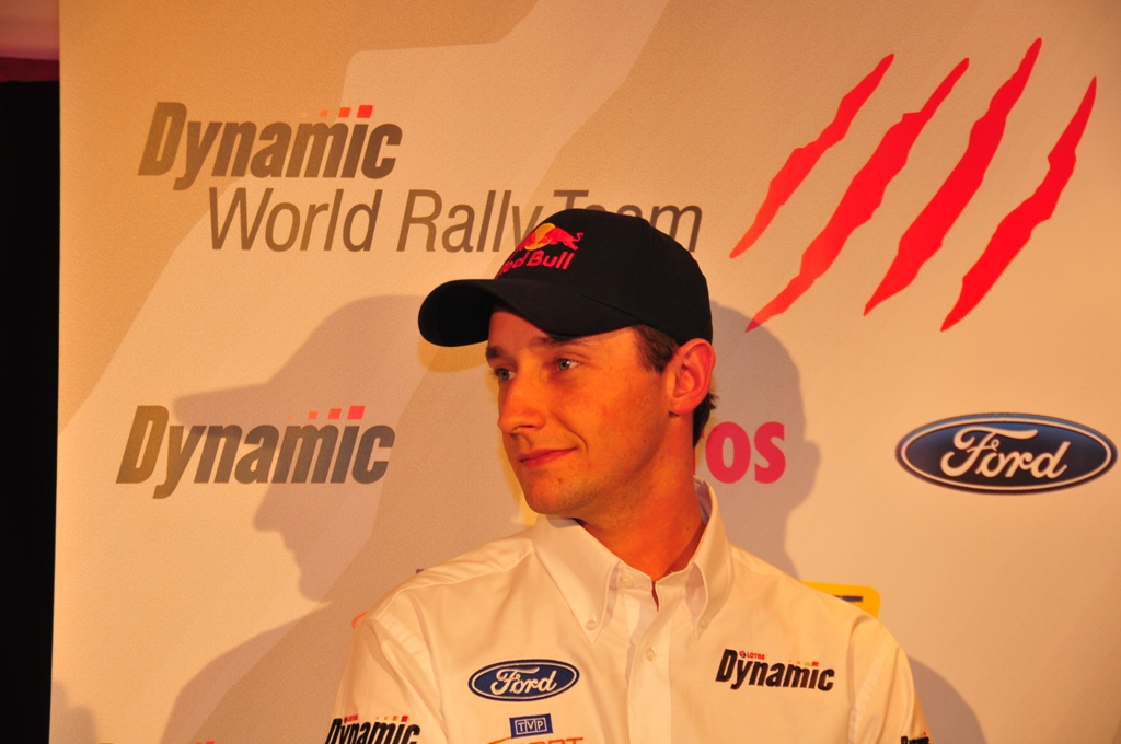 Michał Kościuszko